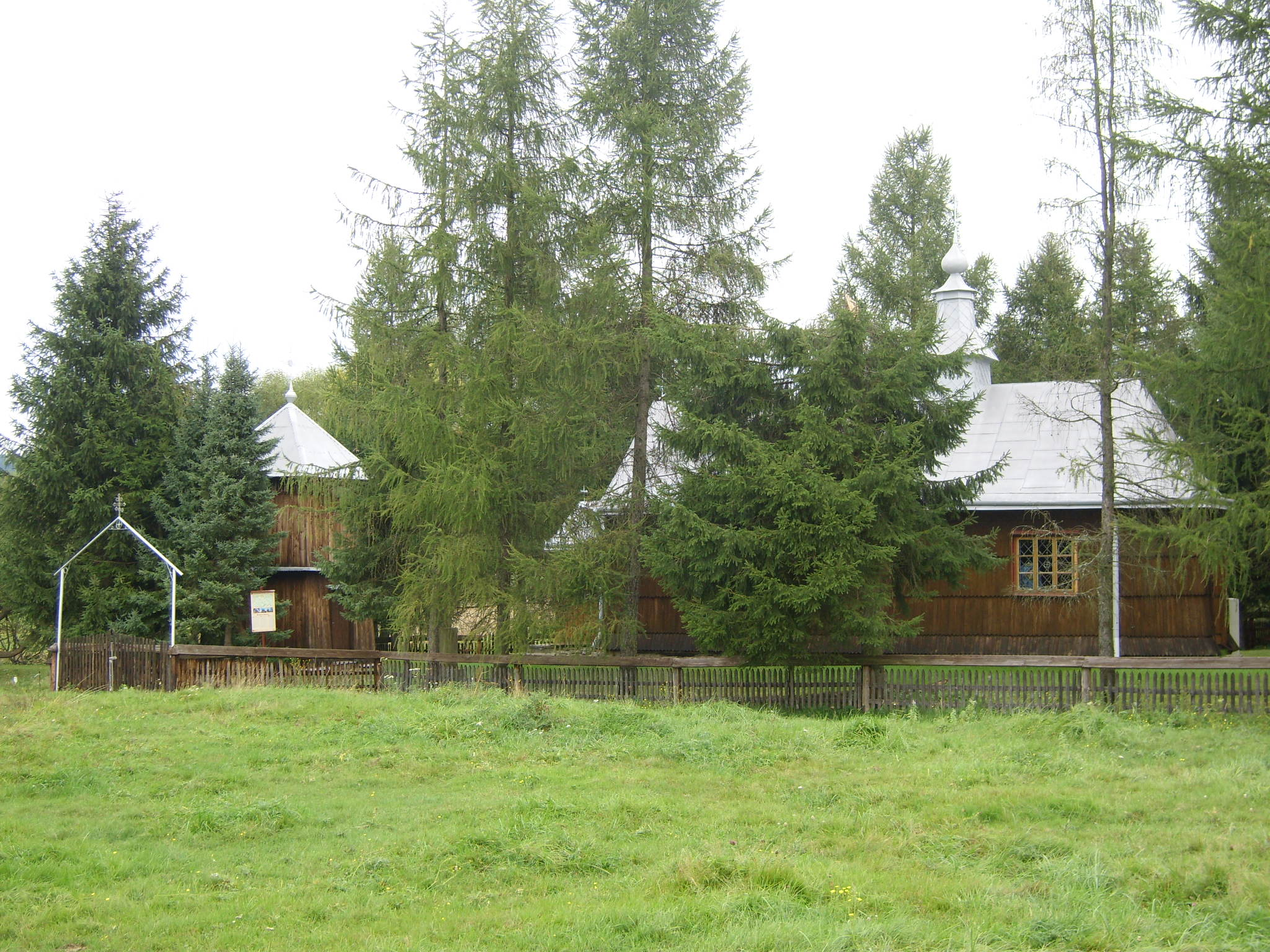 Kaplica parafialna prawosławna Narodzenia św. Jana Chrzciciela w Gładyszowie, zbudowana w 1857 roku jako greckokatolicka, rozbudowana w 1914 roku; ściany starszej części zrębowe i pokryte gontem, dobudowany przedsionek ma kontrukcję słupową.